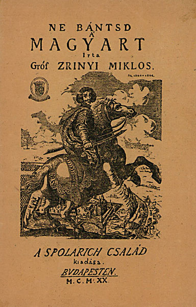 Zrínyi Miklós: Ne bántsd a magyart (Készült Budapesten, az 1790-es kiadás alapján 1300 példányban)